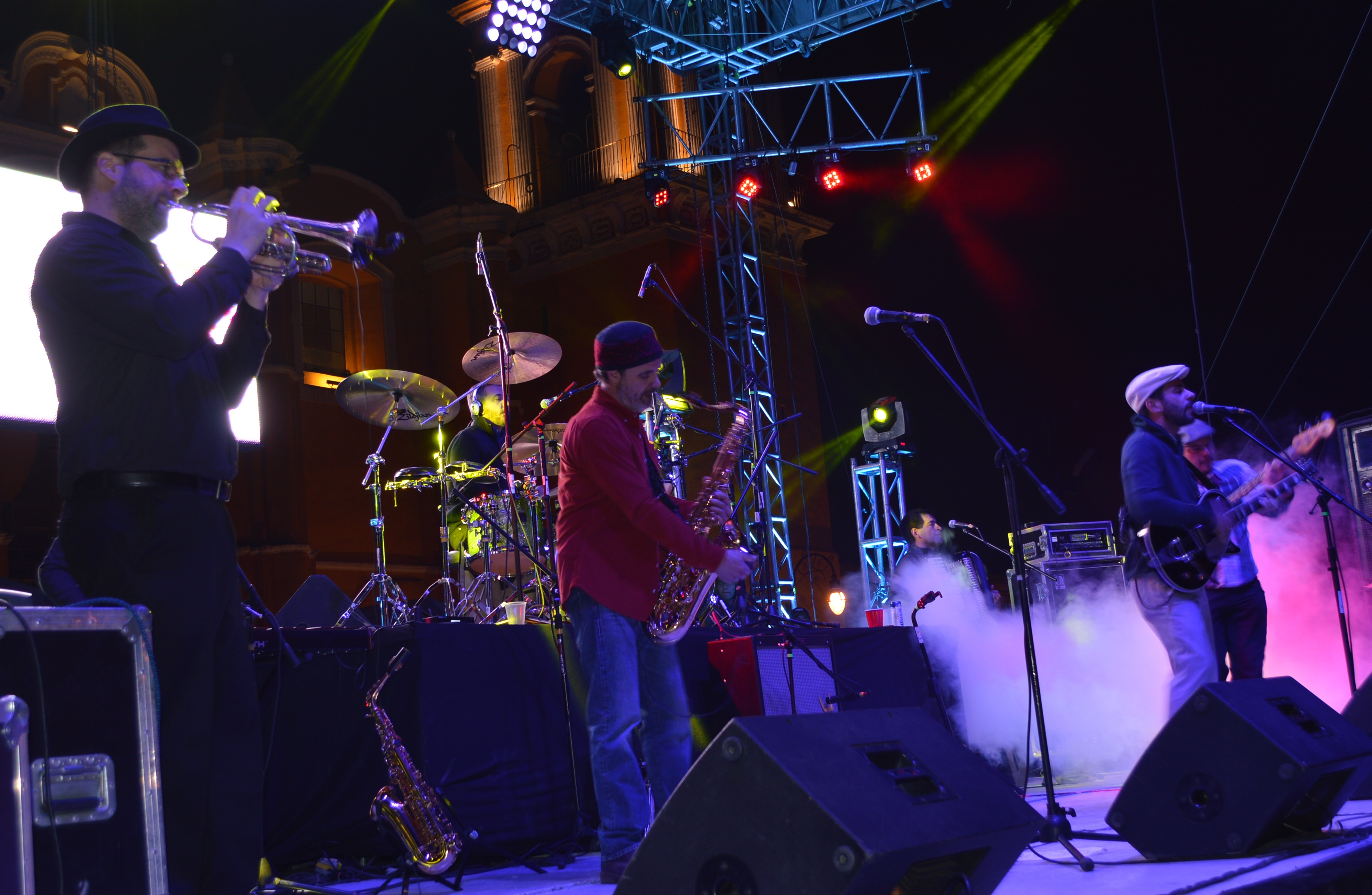 Paté de Fuá en la Plaza de la Concordia, San Pedro Cholula, Puebla, México. 28 de marzo de 2015.